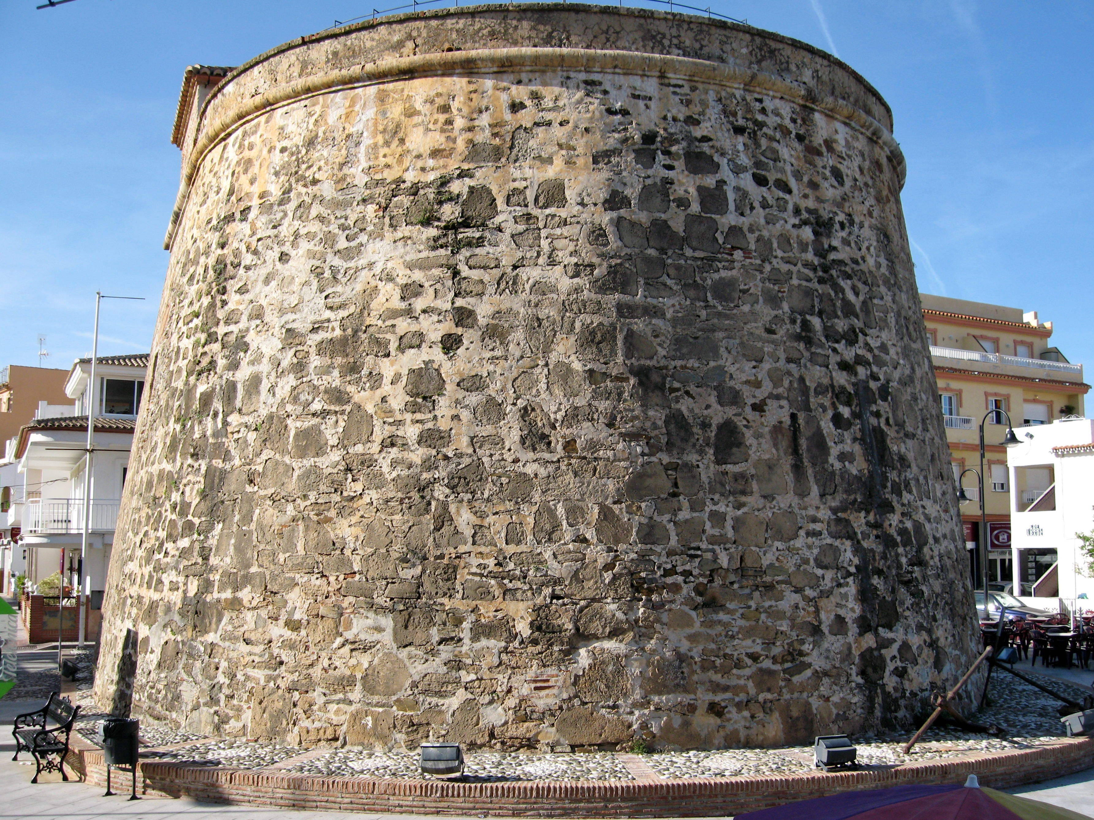 Wachturm (Torres Vigias) von La Cala, Gemeinde Mijas, Provinz Málaga, Andalusien, Spanien